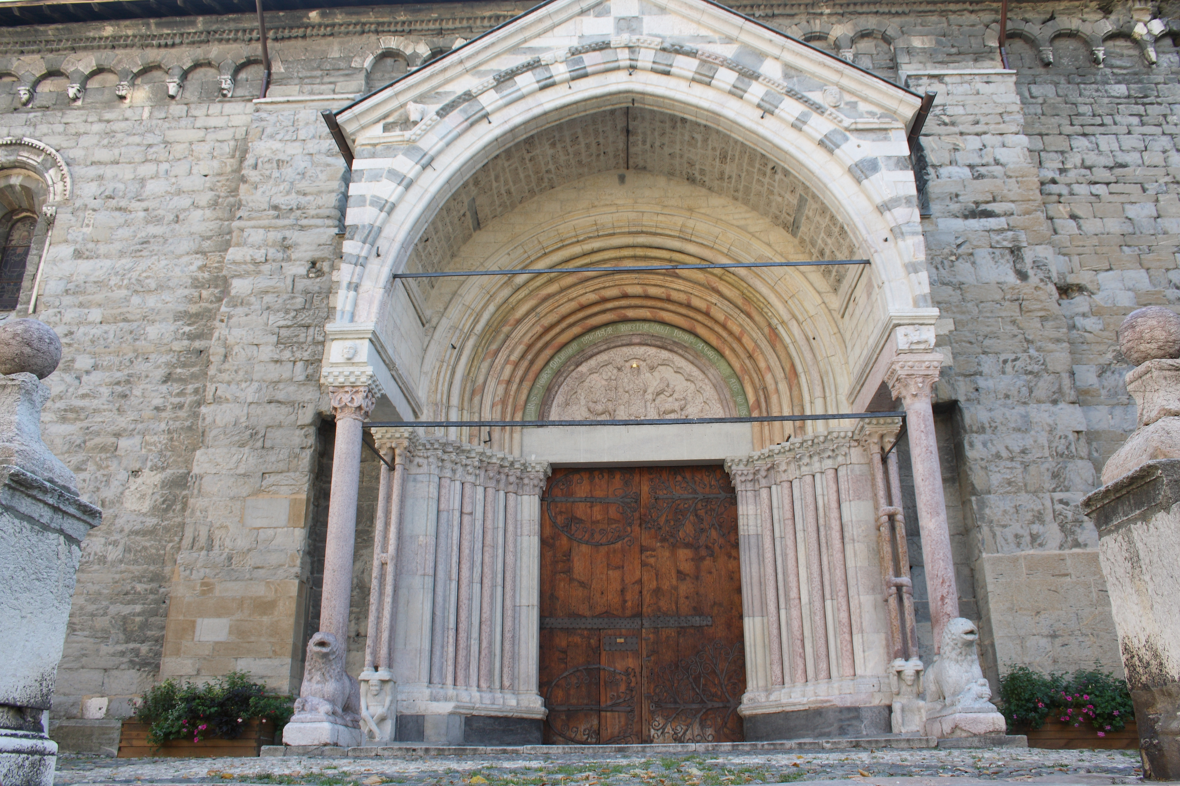 Ehemalige Kathedrale Notre-Dame in Embrun, einer Gemeinde im Département Hautes-Alpes in der französischen Region Provence-Alpes-Côte d'Azur